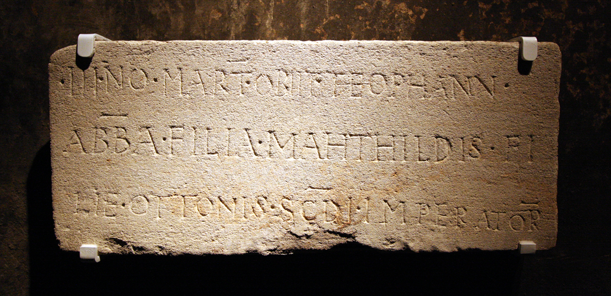 Sonderausstellung „Gold vor Schwarz“ auf Zollverein, Exponate der Essener Domschatzkammer in der ehemaligen Kohlewäscherei. Grabinschrift der Äbtissin Theophanu